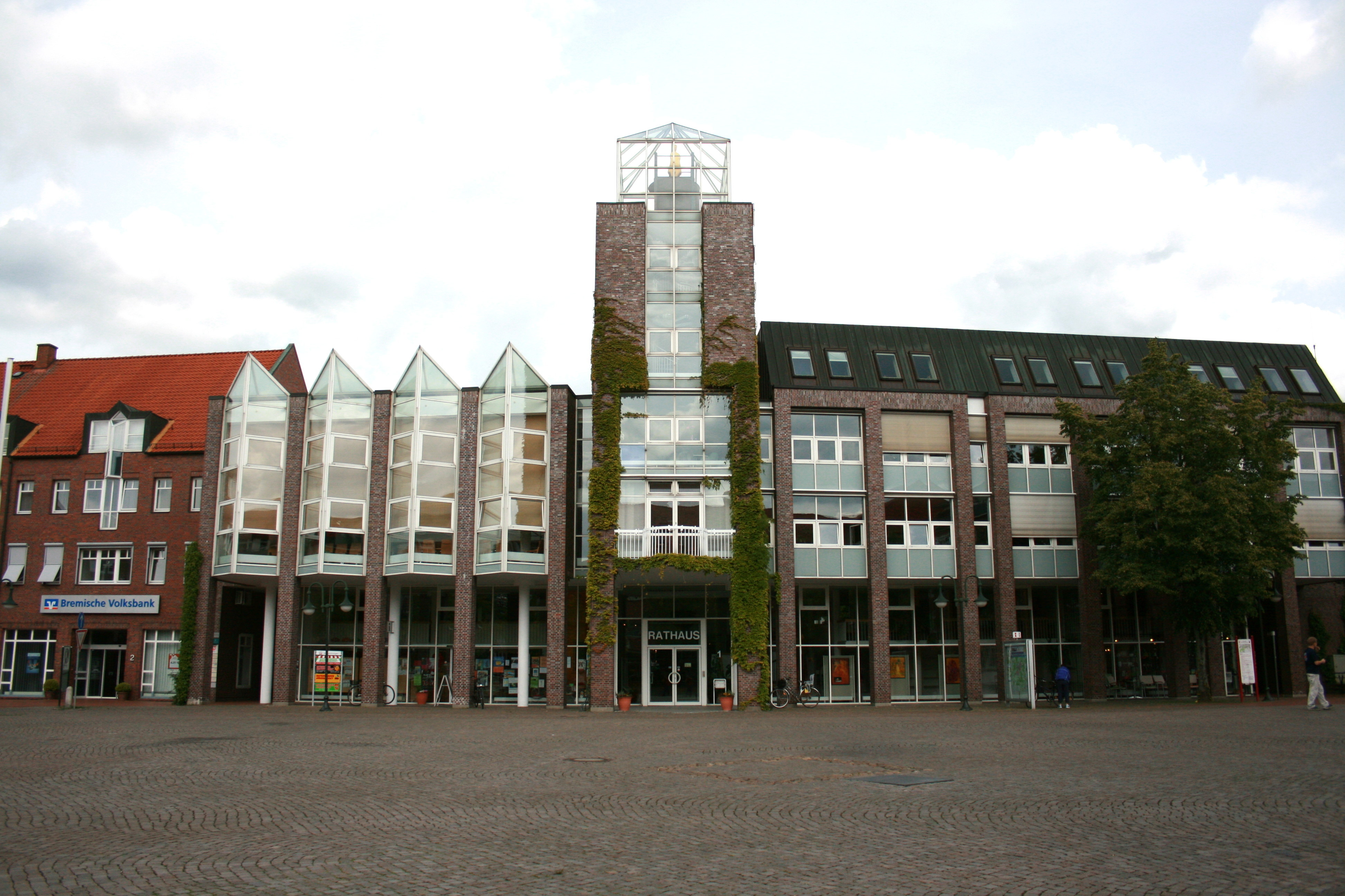 Rathaus in Rotenburg (Wümme)